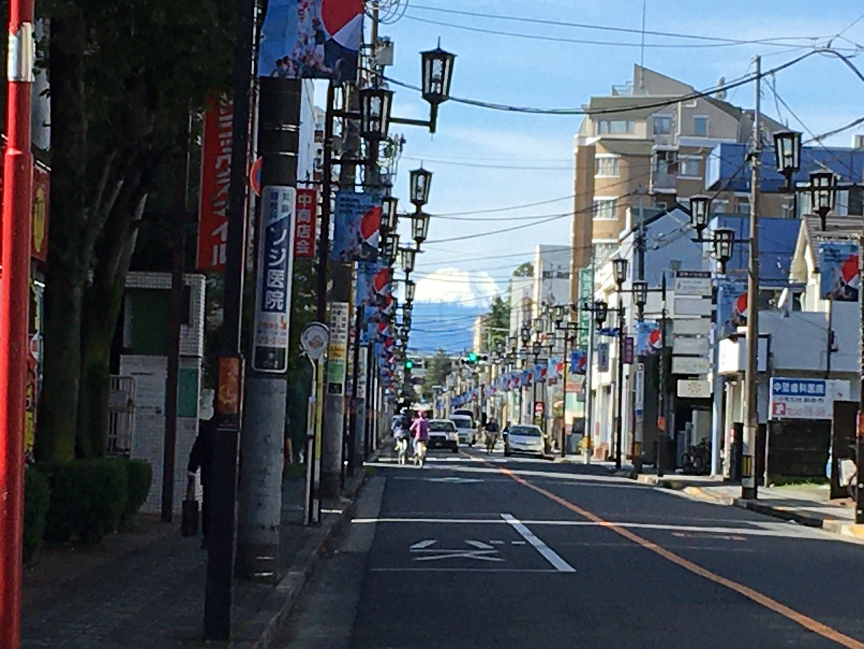 国立市富士見通りから望む富士山